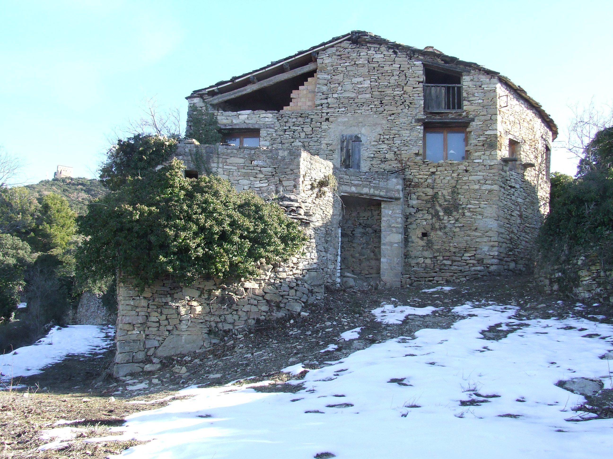 Una casa de Llordà (Isona i Conca Dellà, Pallars Jussà)